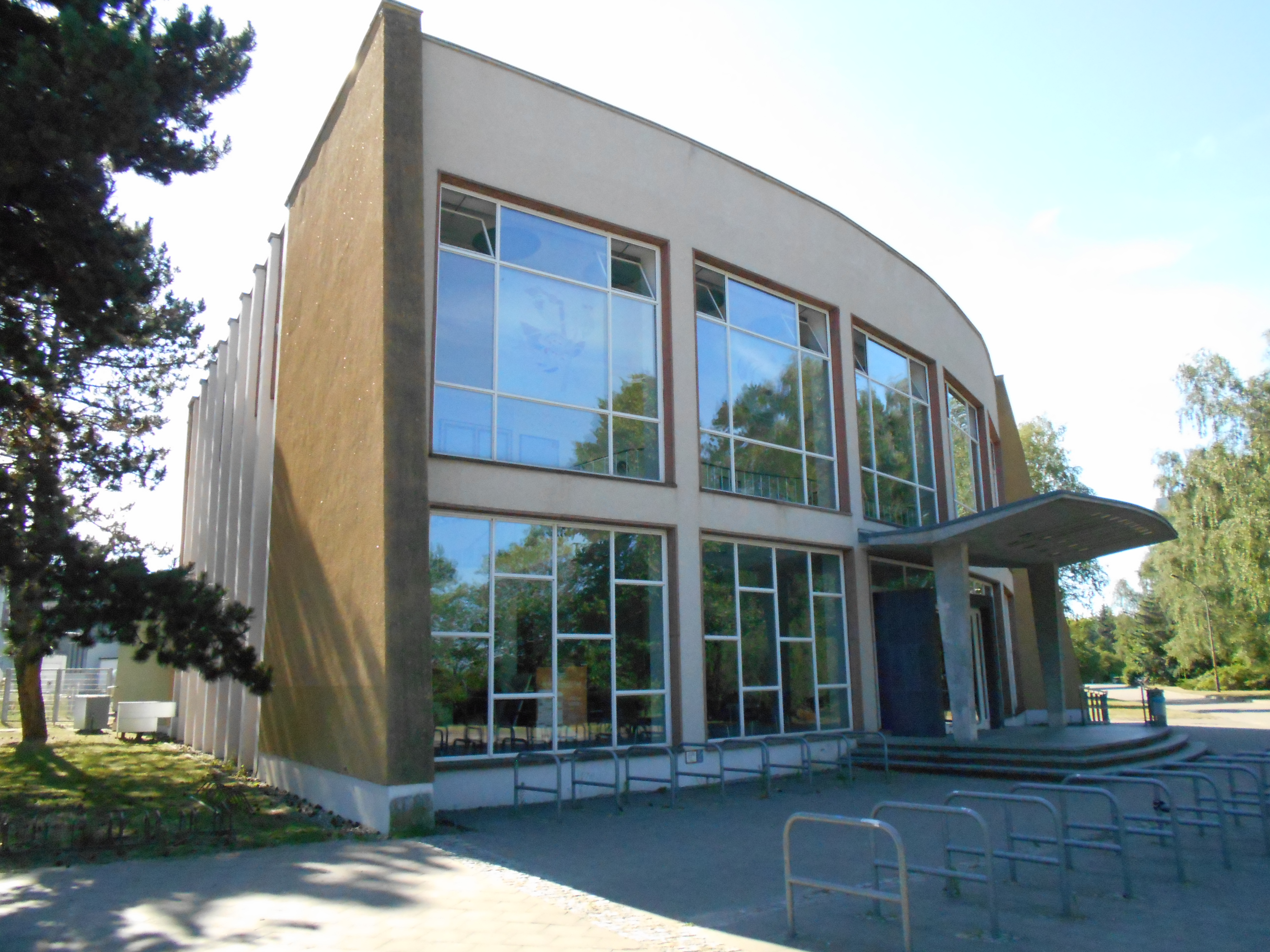 Großer Hörsaal der Schiffbautechnischen Fakultät Rostock